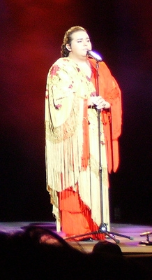 Única foto servible (o casi) desde el sitio que nos dieron, en pleno patio de butacas, que a uno le sigue dando reparo eso de levantarse y sacar fotos en el Arriaga (11 de diciembre del pasado año). Foto de detalle recortada por Kordas.